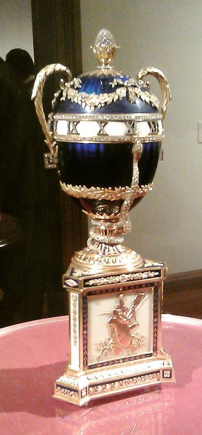 L'Uovo orologio del serpente blu è una delle uova imperiali Fabergé, un uovo di Pasqua gioiello che venne regalato per la Pasqua del 1895 alla zarina madre Dagmar di Danimarca dal figlio Nicola II di Russia.